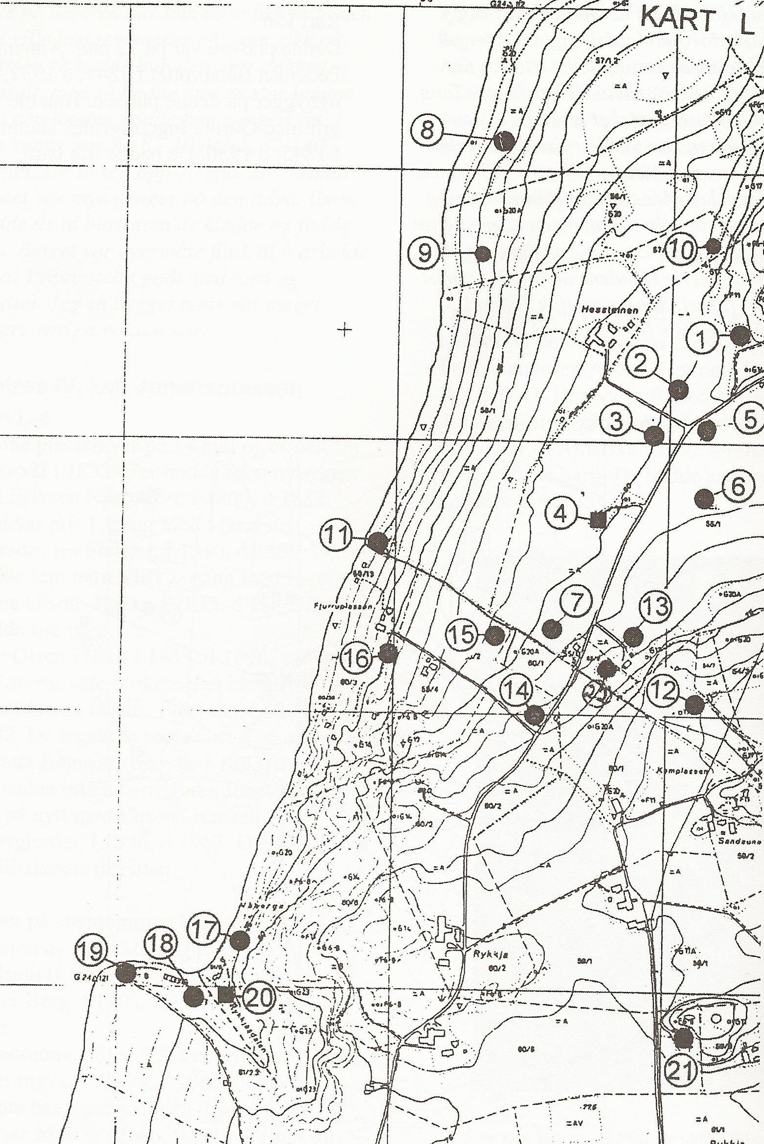 Kart over husmannsplasser under Fløan østre: 1. Fløtrø I / Mattiesplassen 2. Fløtrø II / Kaldstrøa / Kaldsplass 3. Fløtrø III 4. Fløtrø IV / Jonettaplassen 5. Fløtrø V / Pe-plassen 6. Fløtrø VI 7. Marken nedre 13. Marken østre 22. Berget / Marken ytre